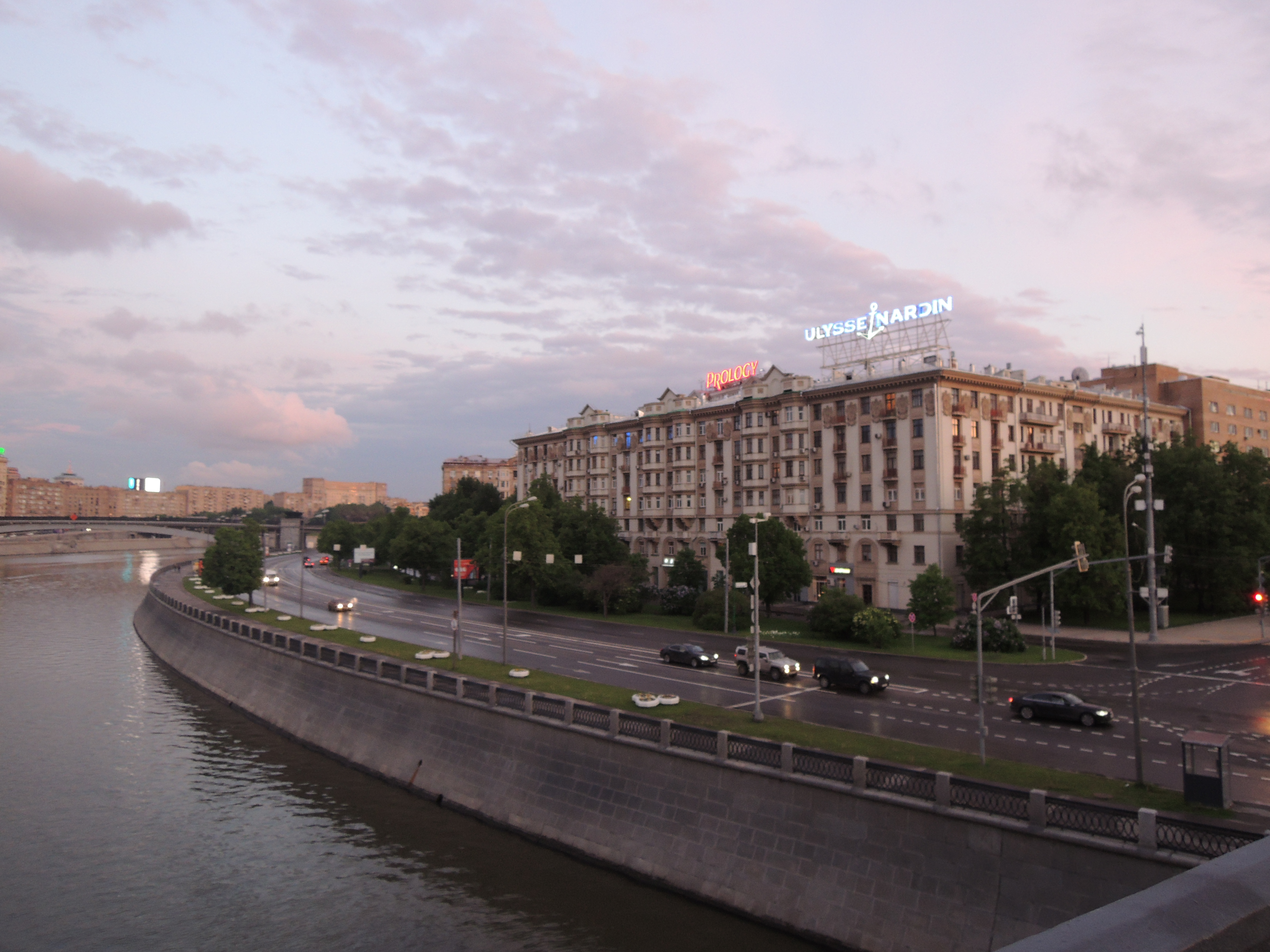 Дом издательства «Известия» (Москва) Семиэтажный кирпичный жилой дом, архитектор Л. М. Поляков. Второй адрес: наб. Тараса Шевченко, 7. (Deutsch) Iswestija Verlag (Moskau)